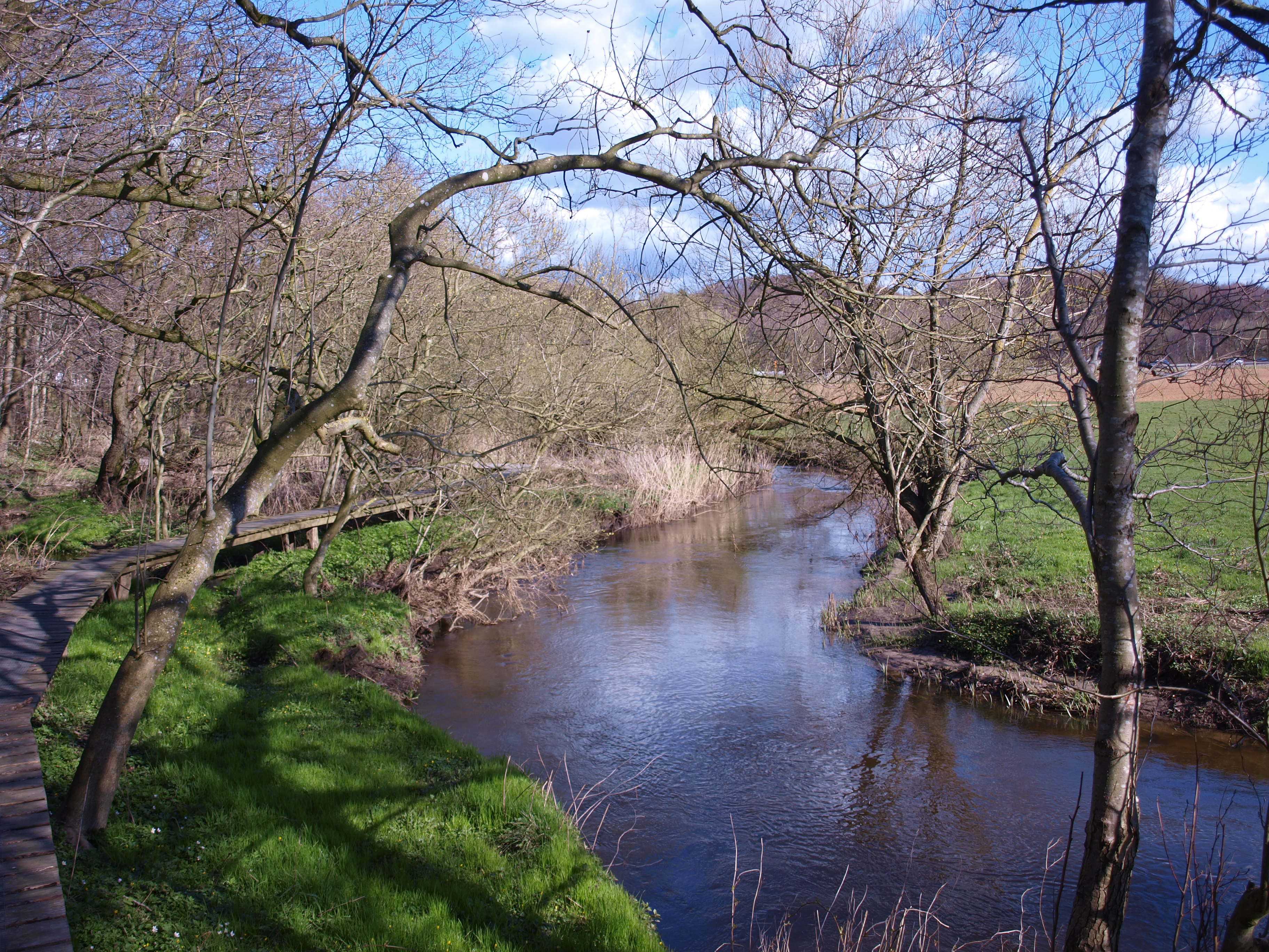 Påby Eng, april 2015